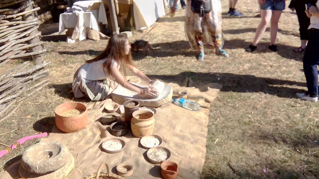 Oenach atlántico de Sedes, en 2015